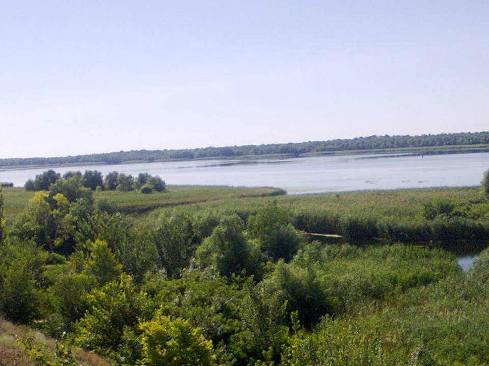 Вид на Днепр весной